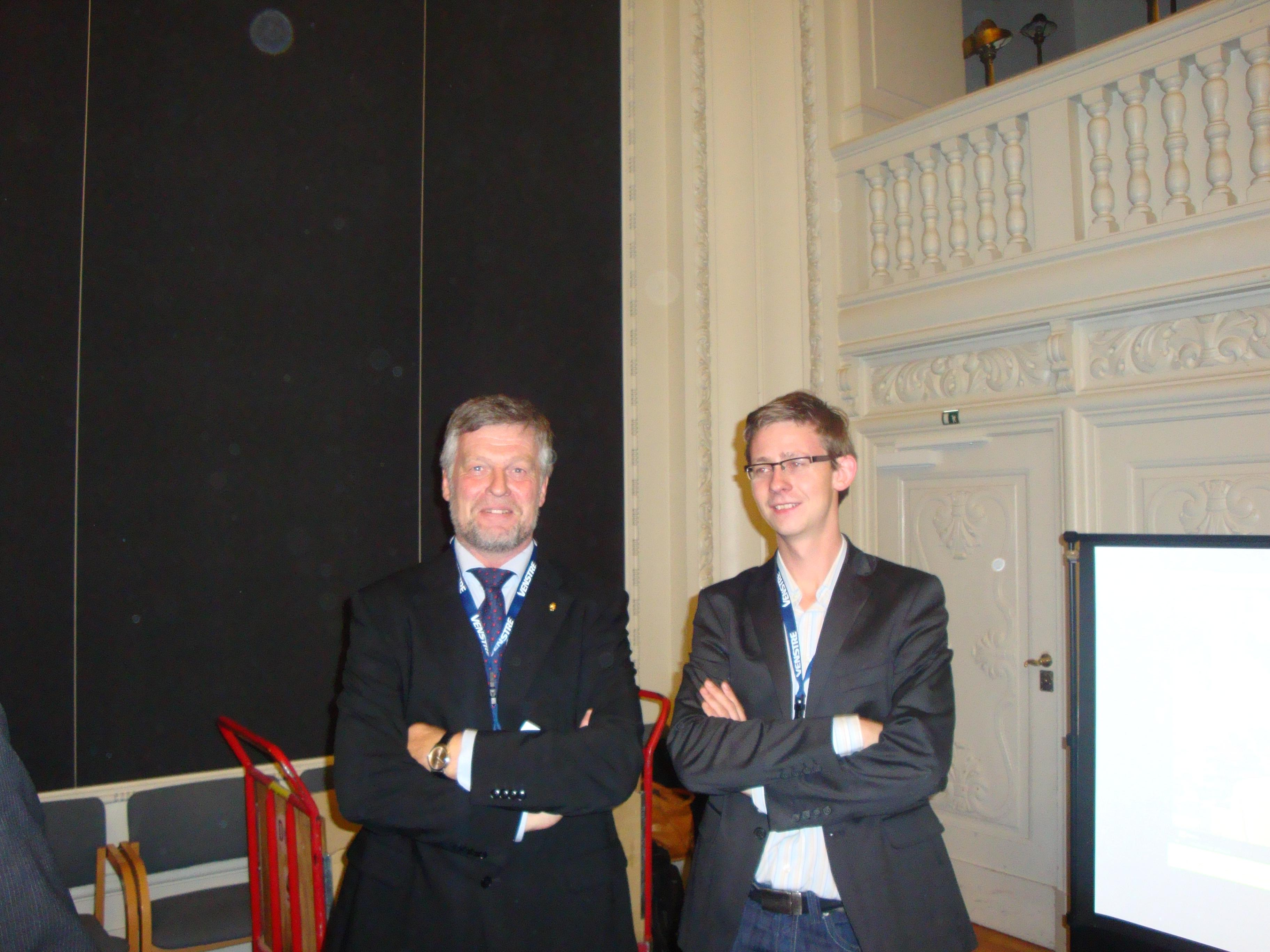 Karsten Nonbo og Karsten Lauritzen på Christiansborg under Kulturnatten 2008.